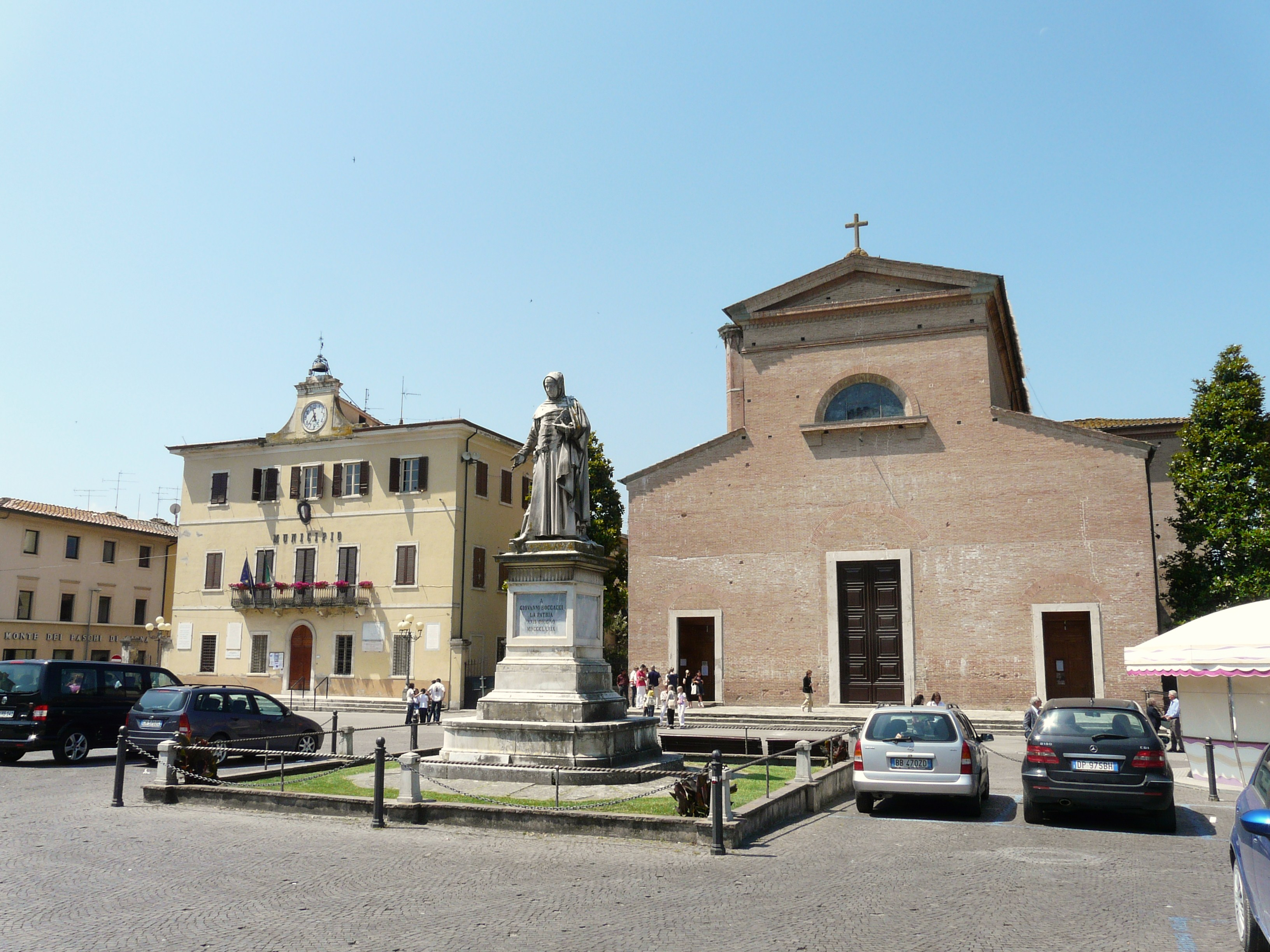 Piazza Boccaccio, Certaldo, Toscana, Italia